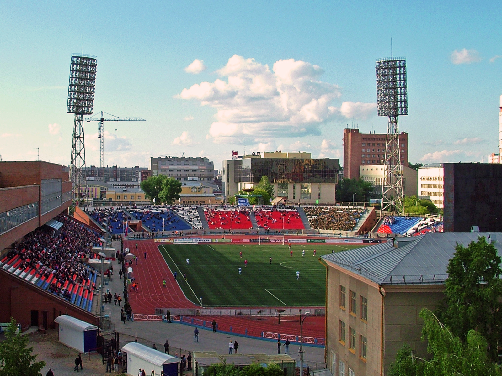 Стадион "Спартак", г. Новосибирск